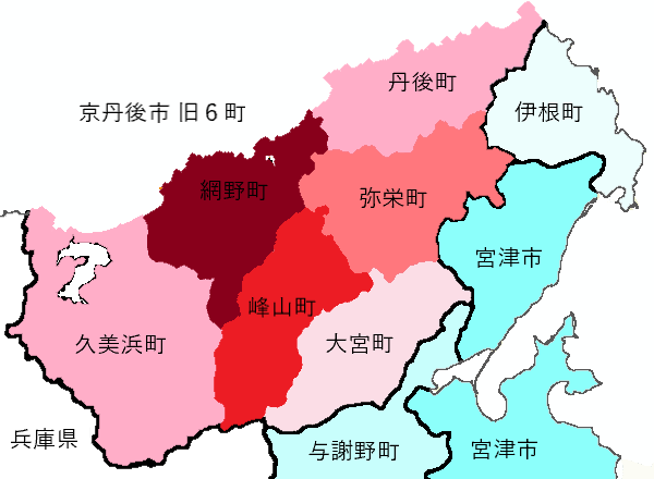 白地図: 国土地理院 地理院タイル白地図(基本測量成果ではない)をベースに、京丹後市旧６町および湖沼のおおまかな位置関係を加筆したもの（正確ではない。）